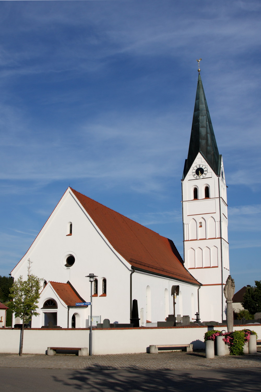 Mitte 19. Jahrhundert;This is a photograph of an architectural monument.